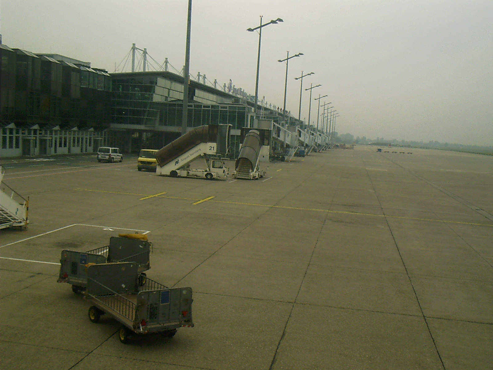 Rollfeld des Flughafen Nürnberg